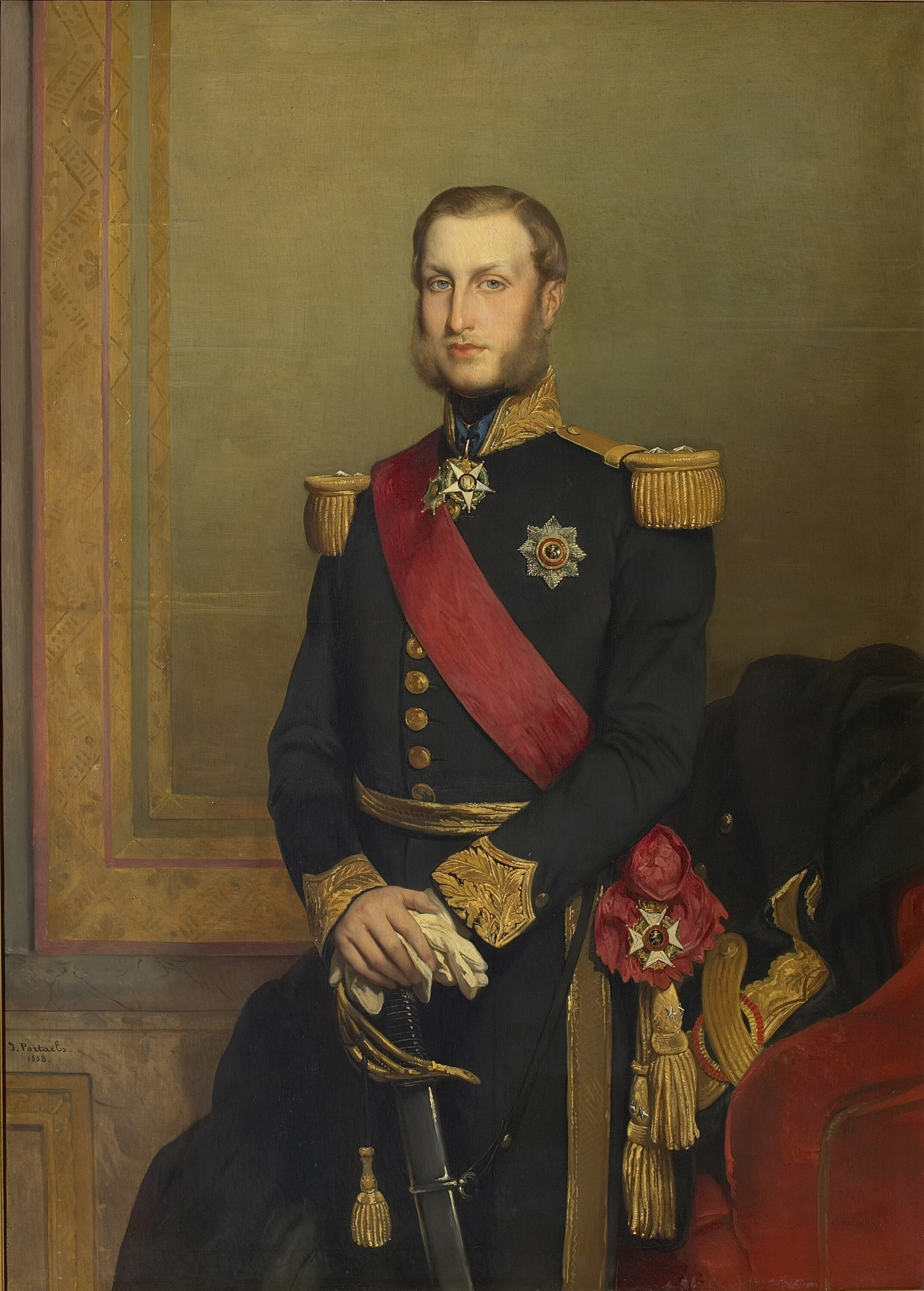 Portrait de S.A.R. Monseigneur le Comte de Flandre